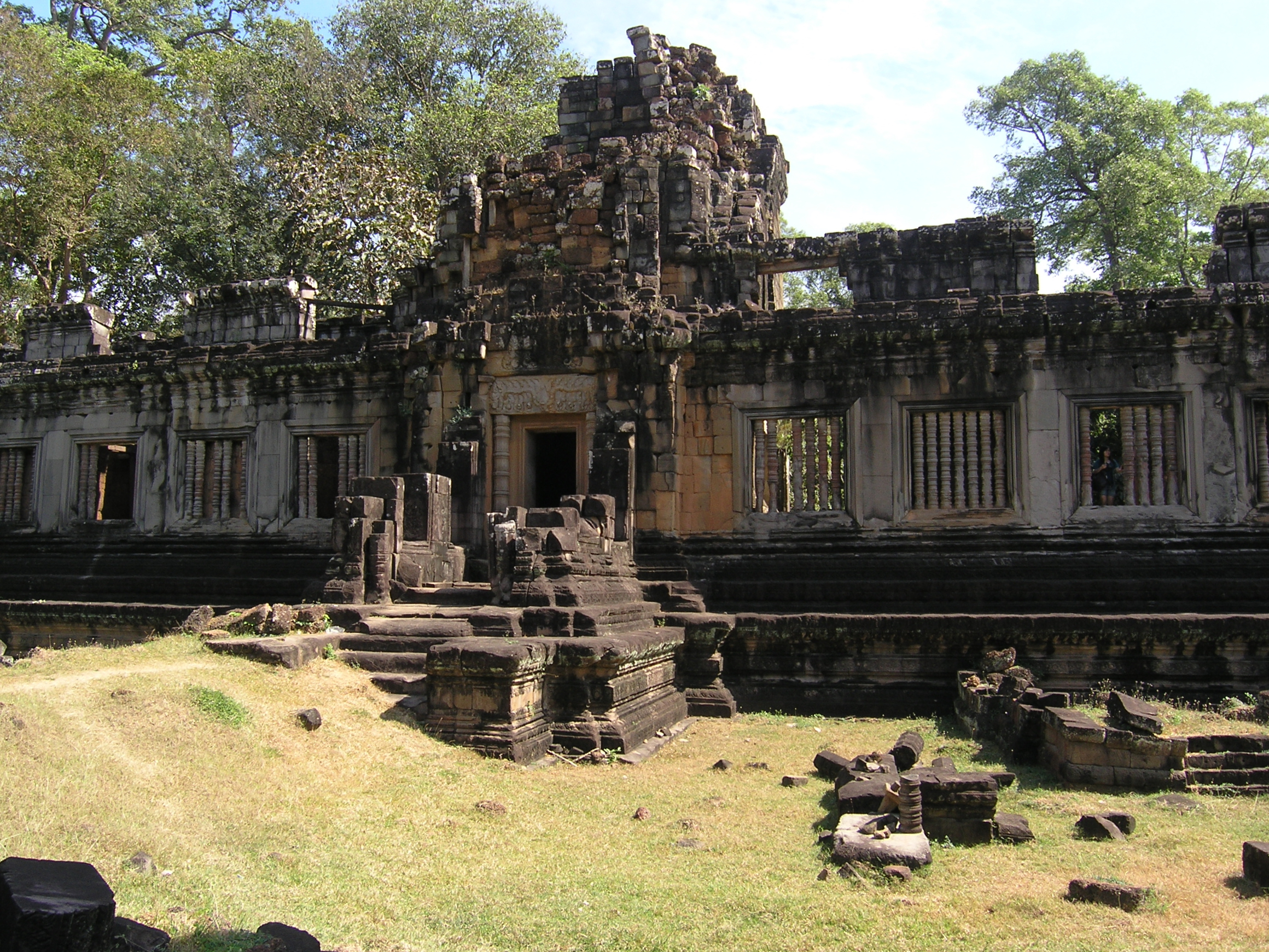 北クリアン North Khleang, Angkor, 2009